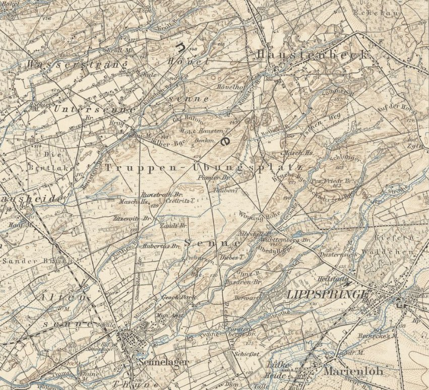 Karte des Deutschen Reiches / Blatt 332 Gütersloh / Ausschnitt Truppenübungsplatz Senne Aufgenommen 1892/95, hrsg. 1902, einzelne Nachtr. 1909